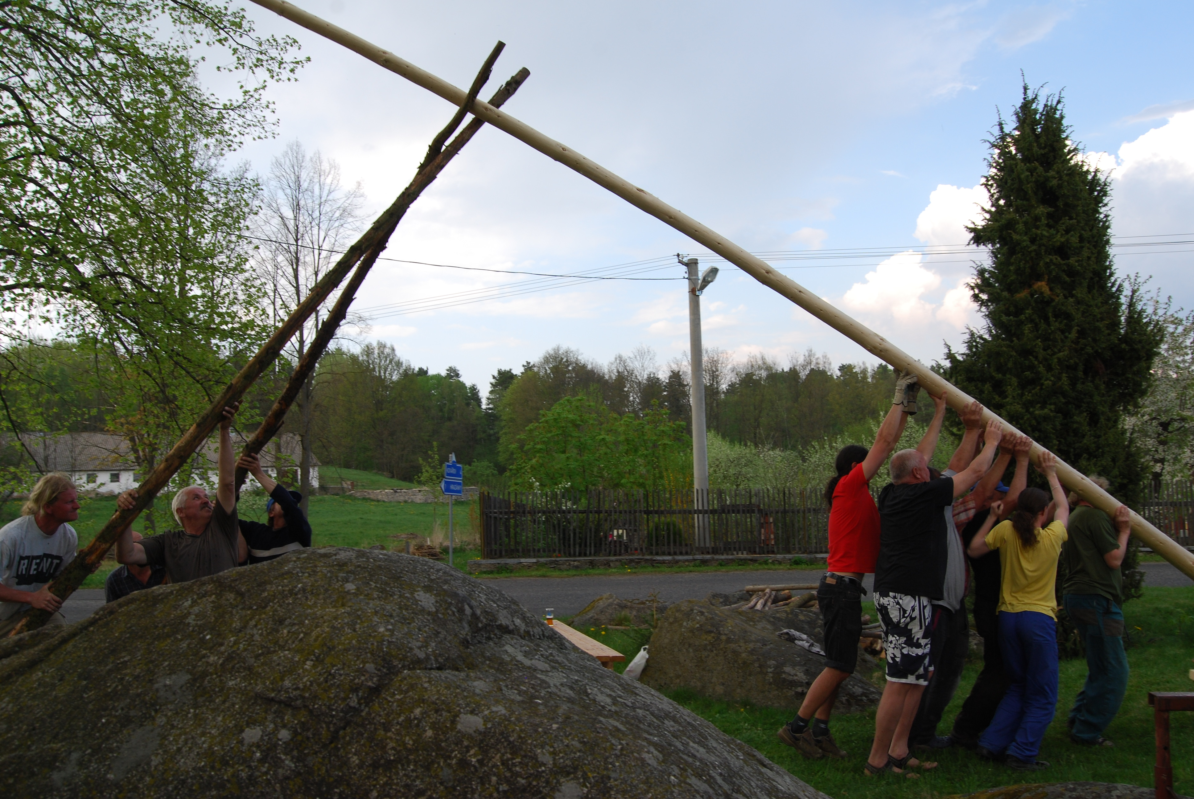 Hrazany. Okres Písek. Česká republika. Stavění máje.